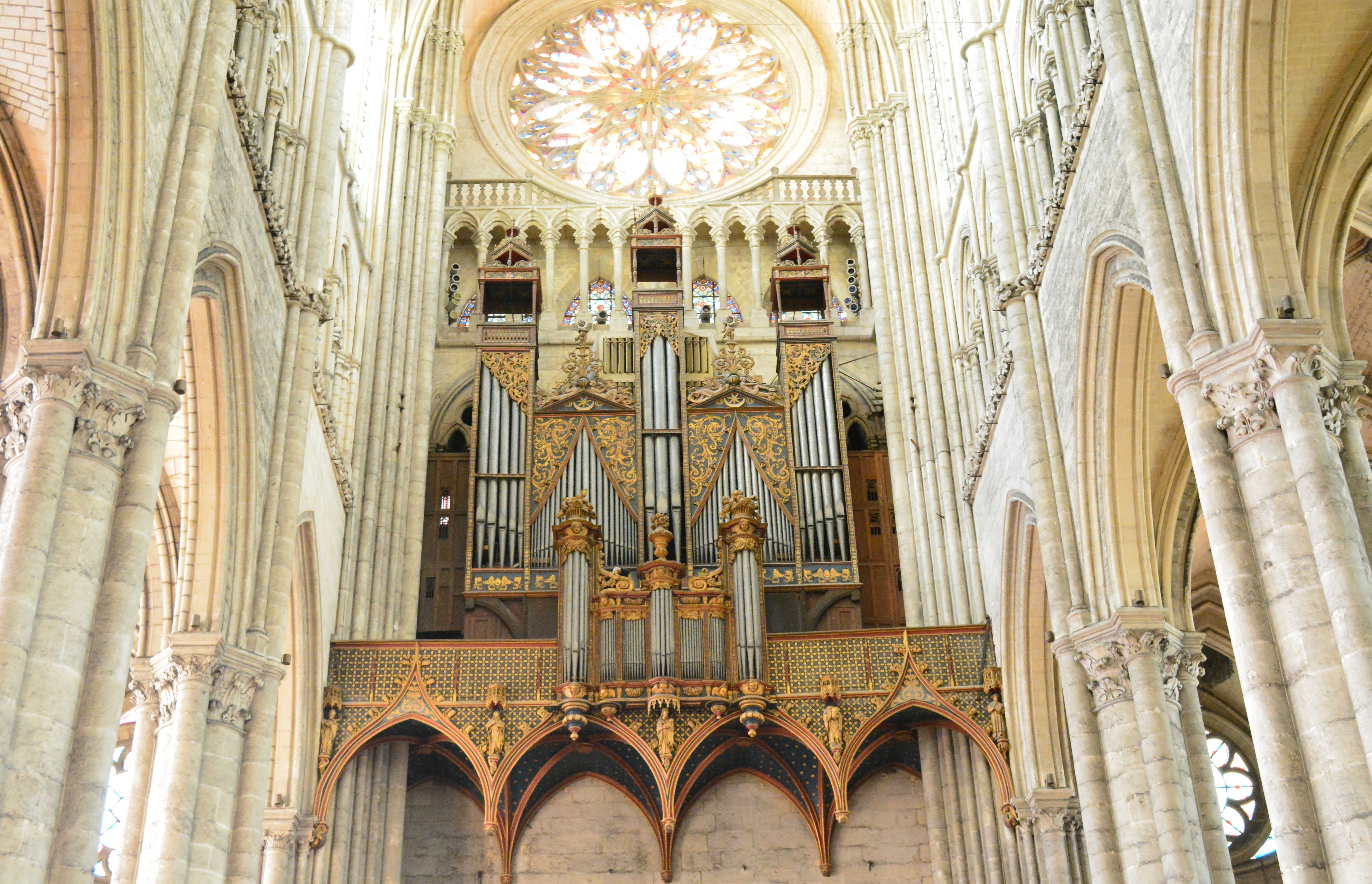 Le grand orgue de la cathédrale d'Amiens .